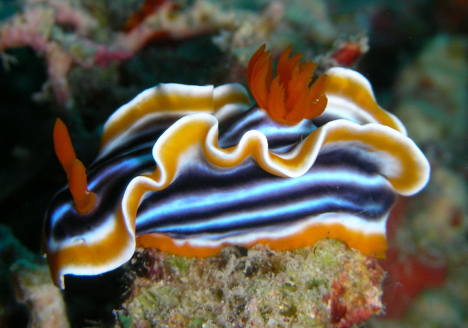 Chromodoris magnifica